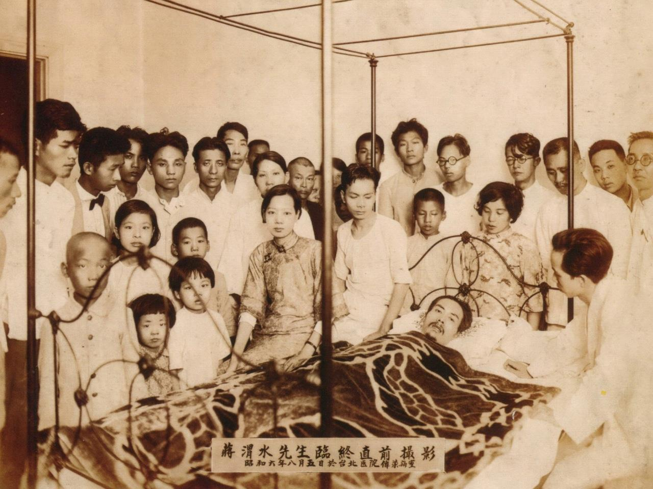 蔣渭水臨終前留影